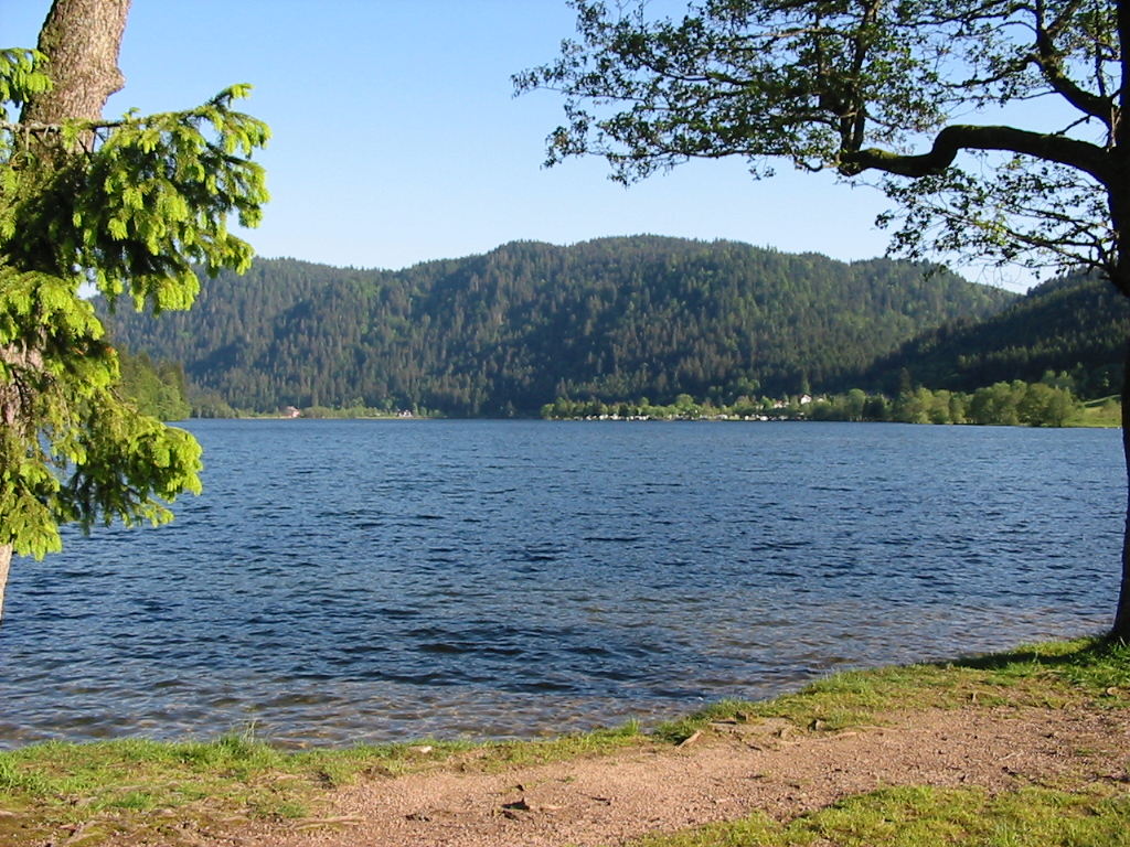 Lac de Longemer Commune de Xonrupt-Longemer (88400), France Photographie personnelle prise le 8 juin 2006. Copyright © Christian Amet